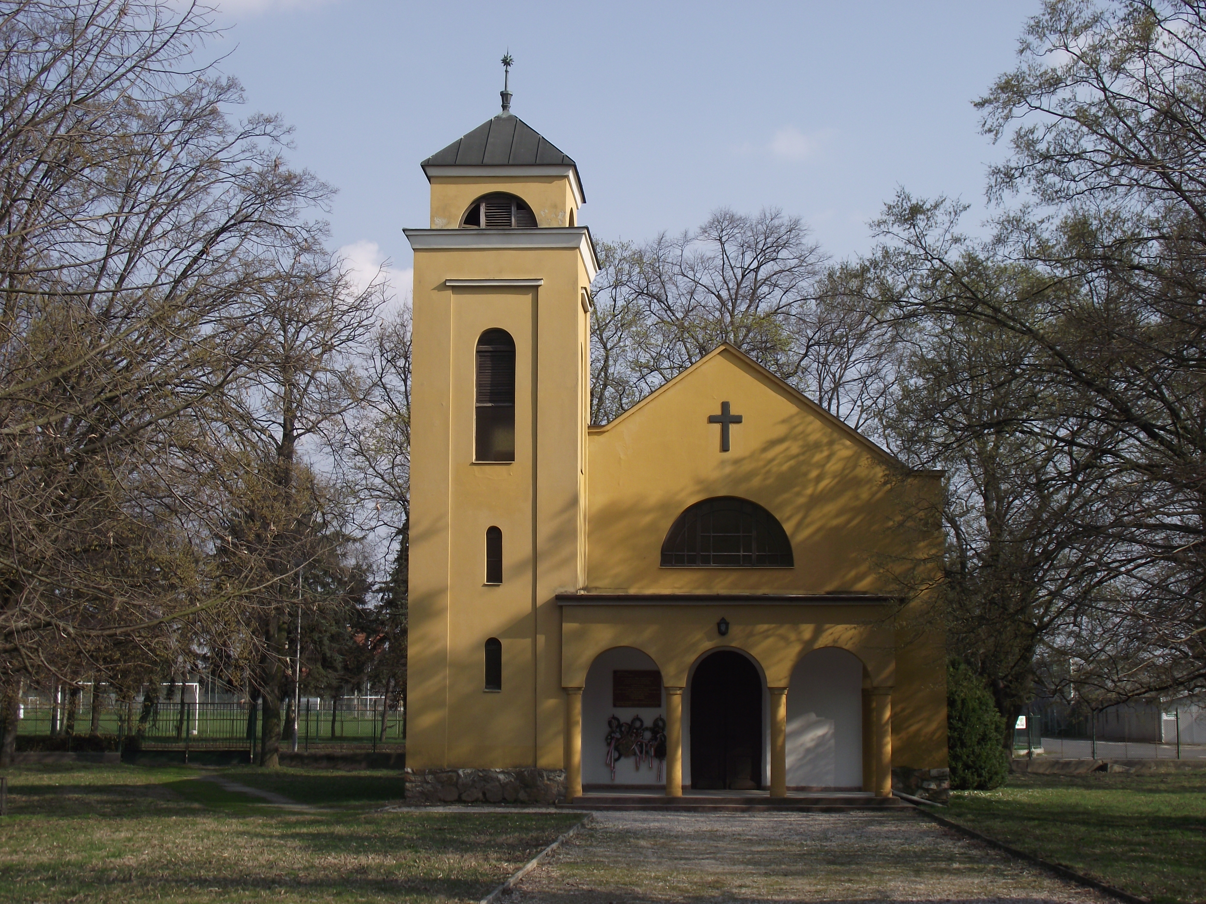 Bábolna - Protestáns templom